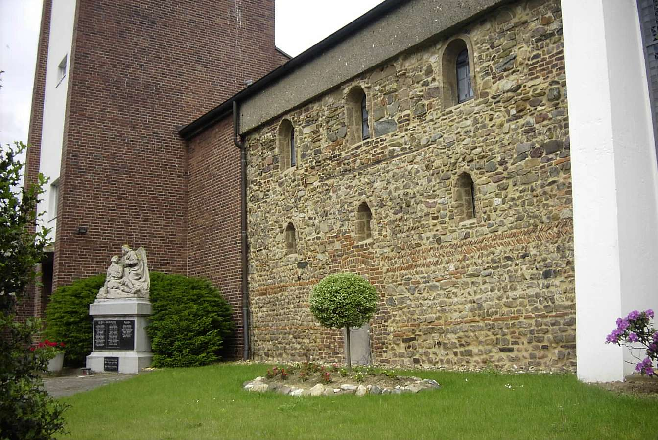 Summary Bildbeschreibung: Kirche in Kofferen mit mittelalterlichem Mauerstück in der Südwand Quelle: eigenes Foto Fotograf/Zeichner: bodoklecksel 15:26, 5. Jun 2006 (CEST) Datum: Juni 2004 Sonstiges